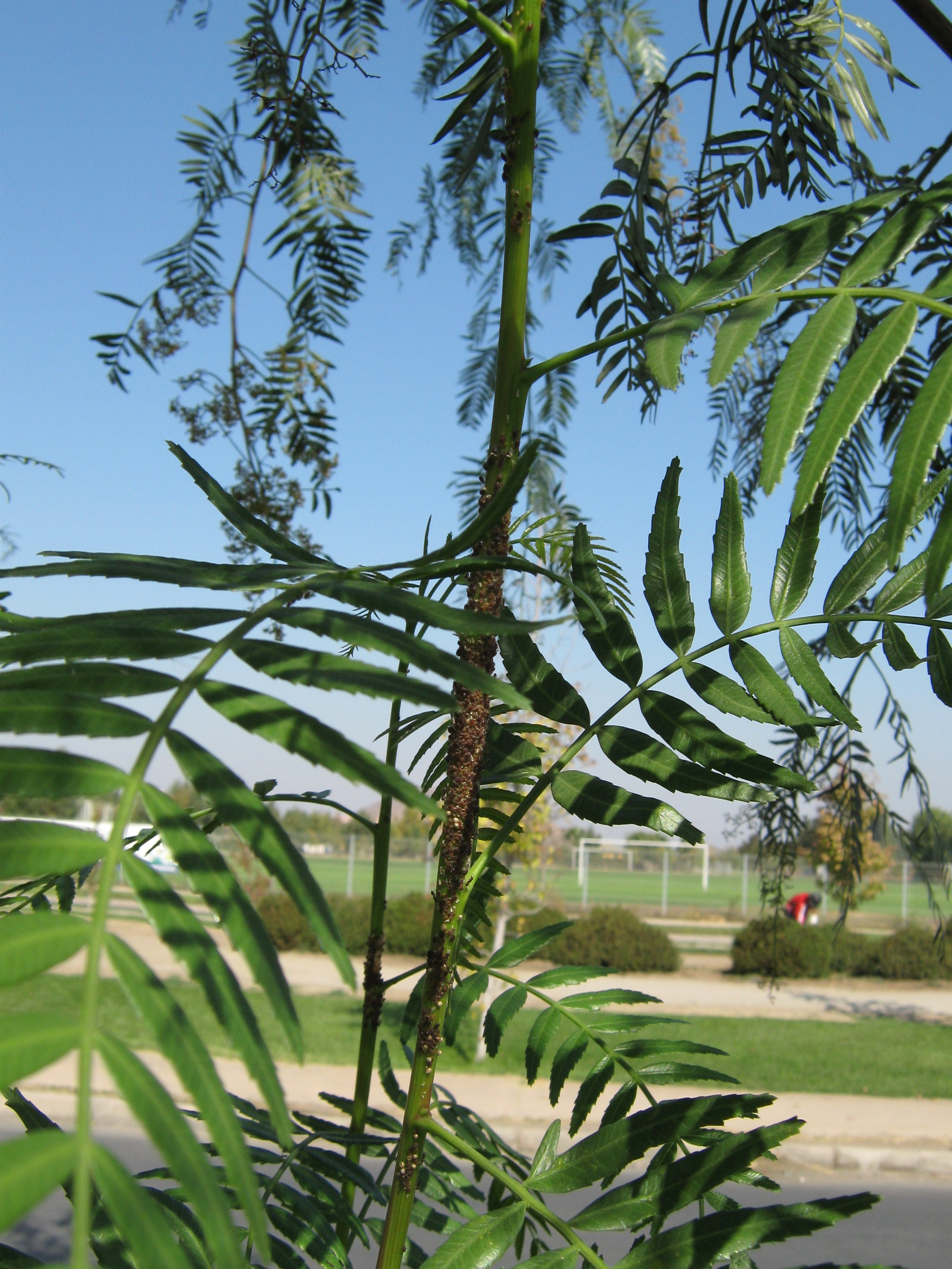 afidos y hormigas sobre rama de Schinus areira